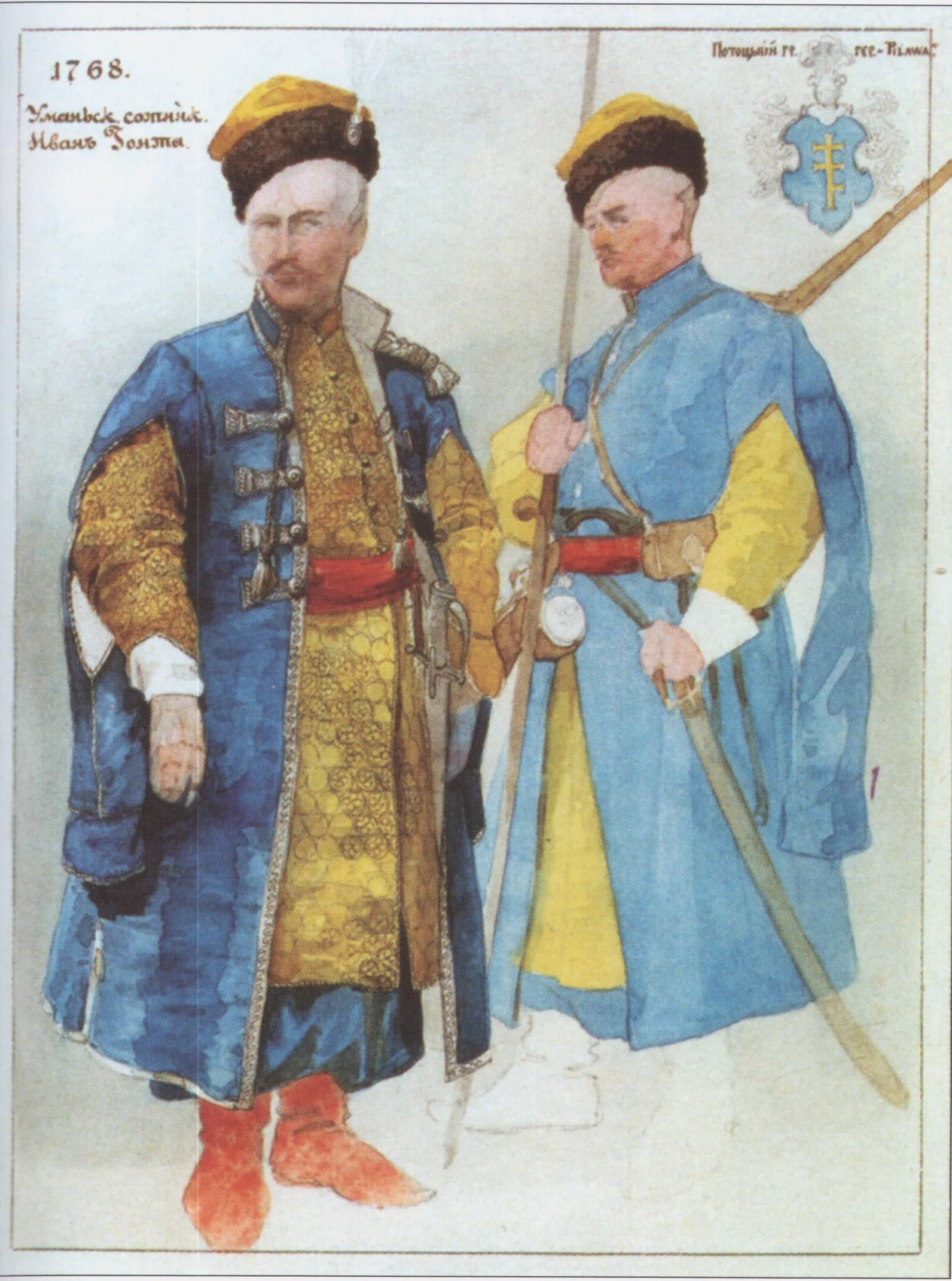 Уманьский сотник Иван Гонта.